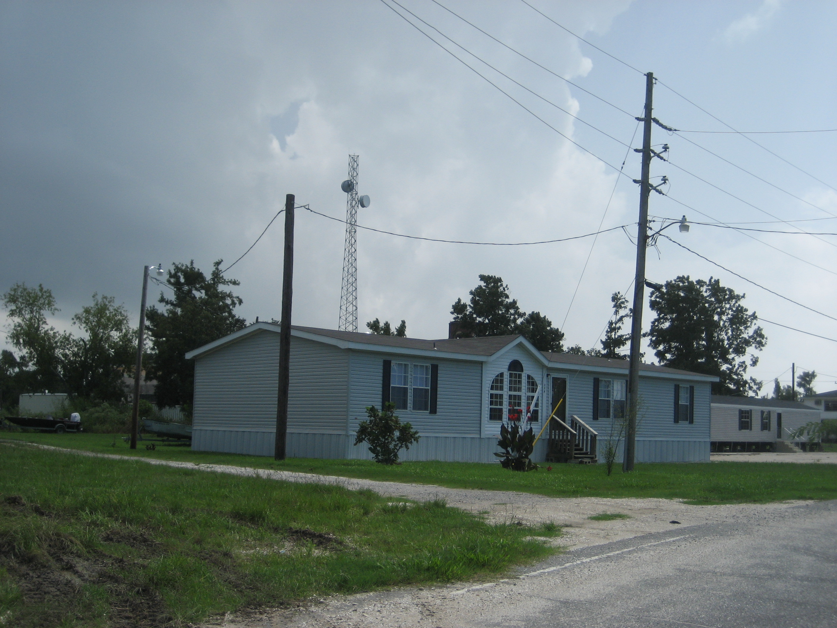 Post-Katrina residential building, Pointe à la Hache, Louisiana.